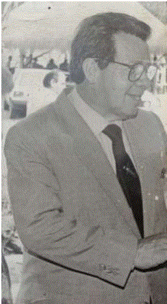 Antonio Díaz García